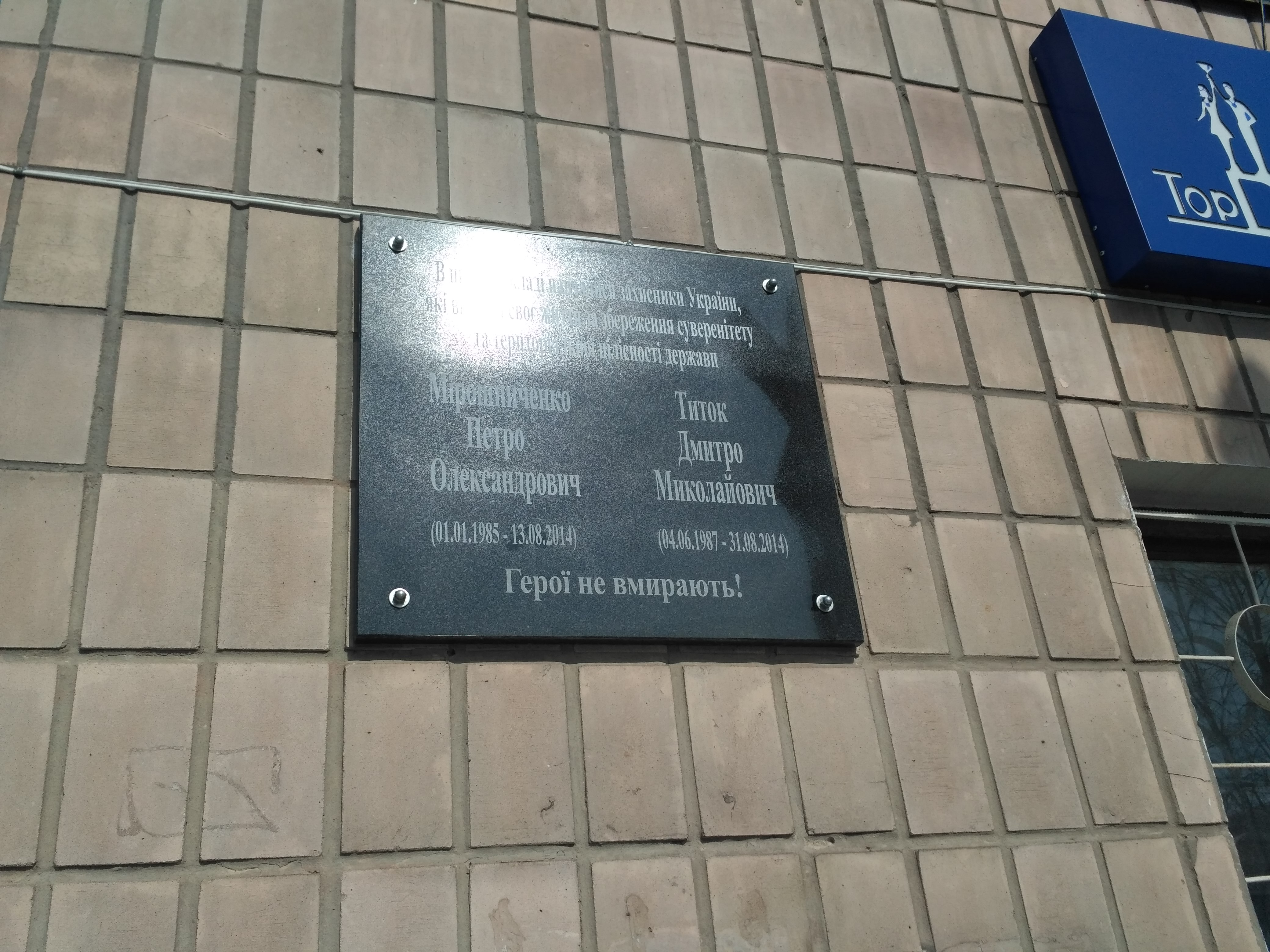 Памятная доска Петру Мирошниченко и Дмитрию Титку в Чернигове.